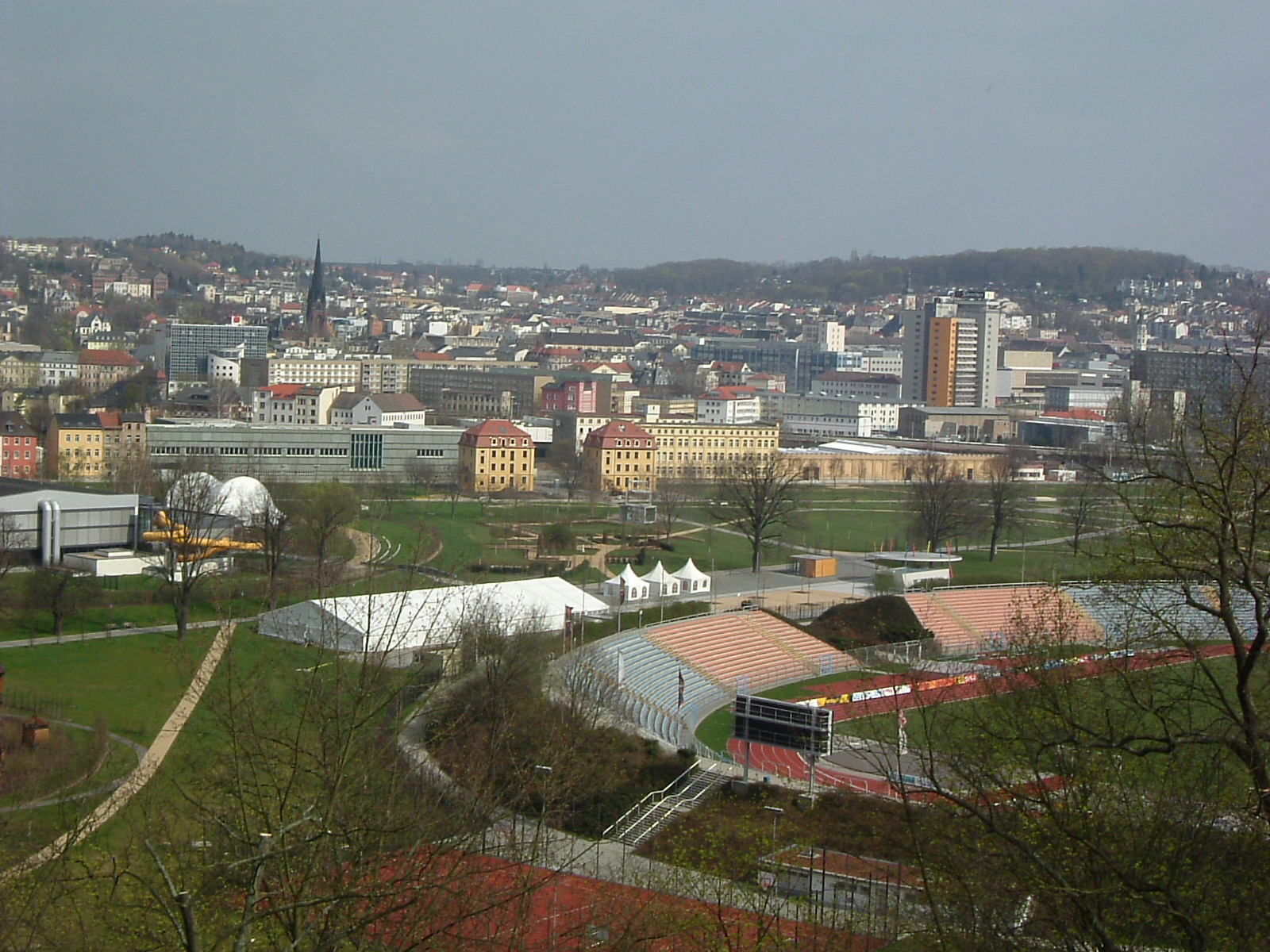 Hofwiesenpark before BUGA